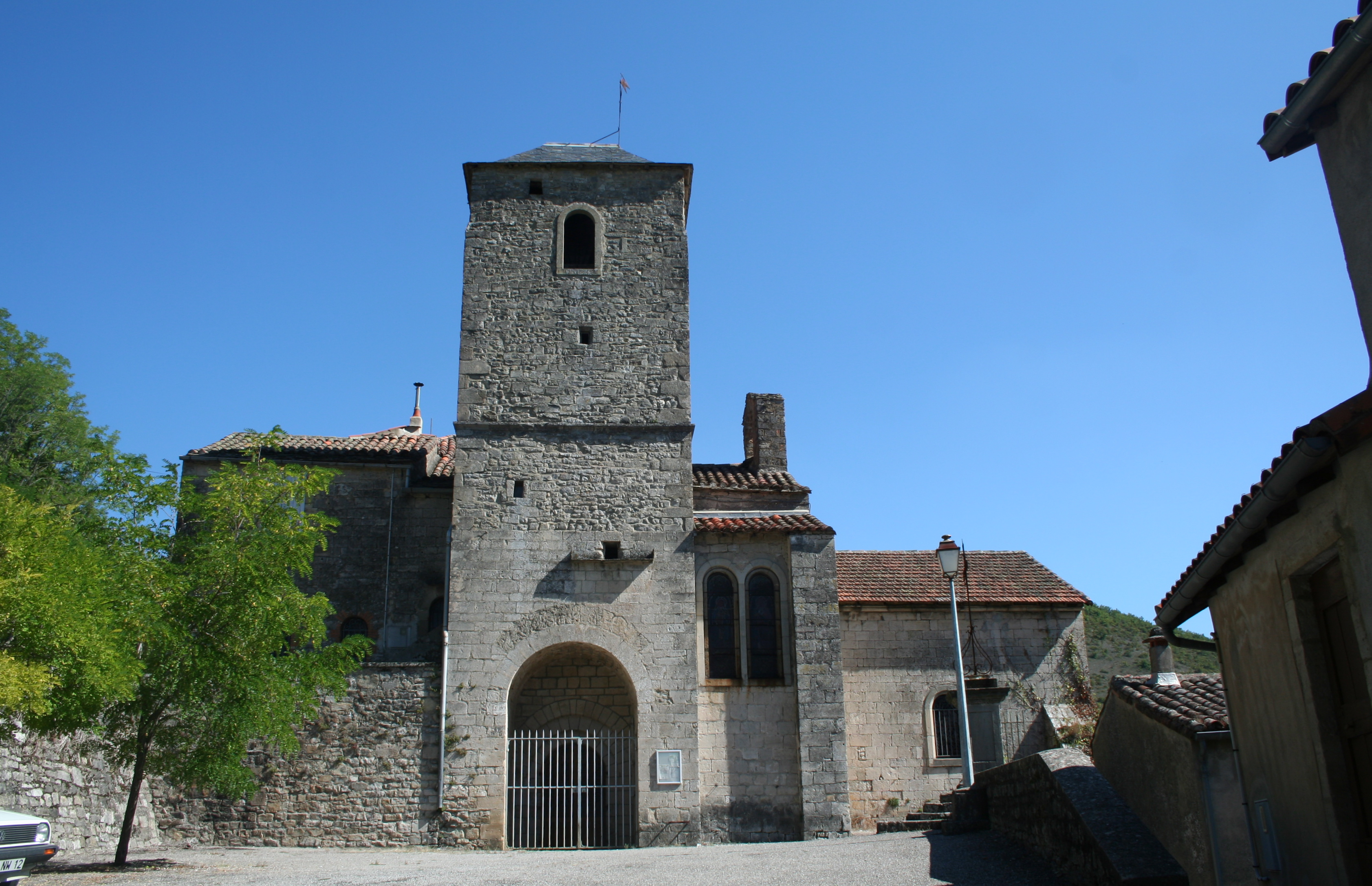 Fondamente (Aveyron) - église romane Saint-Pierre.